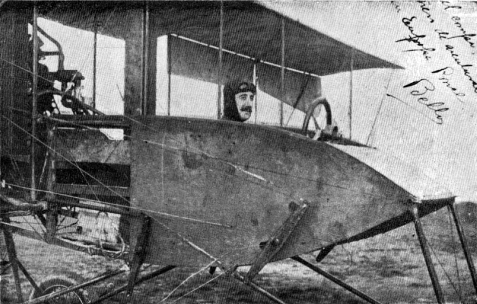 El teniente 1º Alejandro Bello Silva (*1887 - ¿1914?), fue un aviador chileno que se extravió en 1914, mientras efectuaba una prueba necesaria para obtener el título de piloto militar.